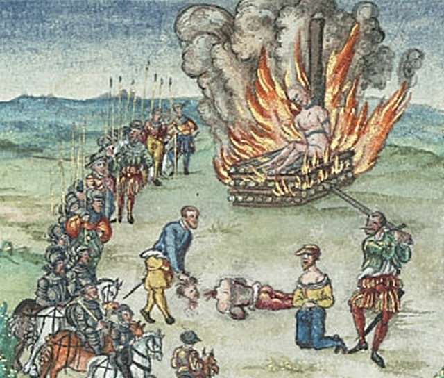 Buch-Illustration aus der Chronik der Würzburger Bischöfe des Lorenz Fries, Mitte 16. Jahrhundert